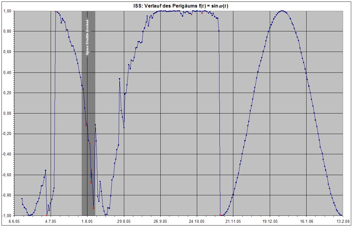 Internationale Raumstation: Verlauf des Arguments des Perigäums